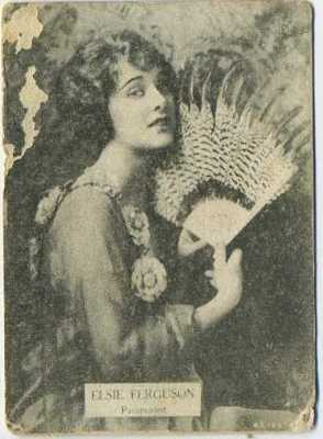 Elsie Ferguson